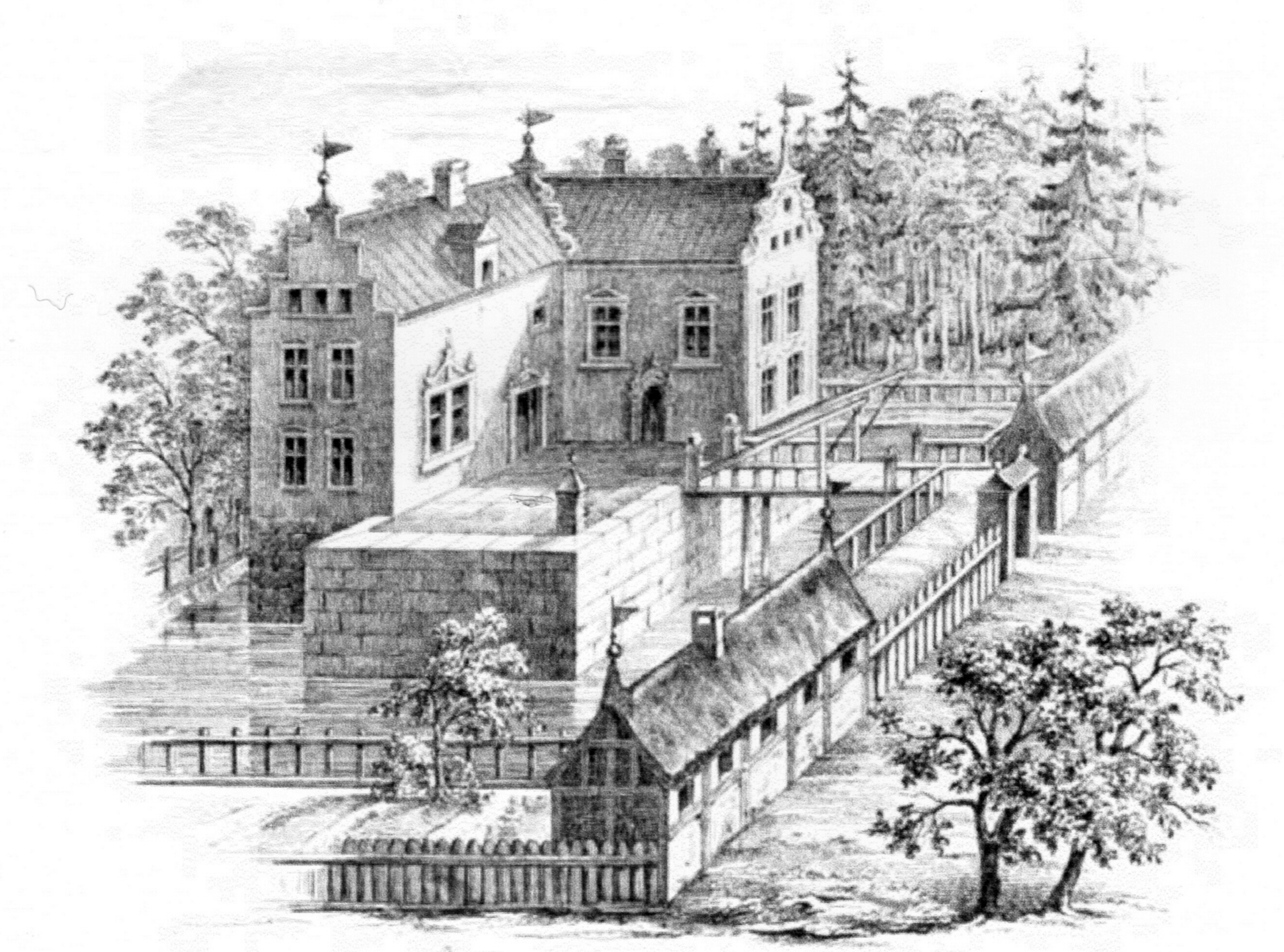 Das alteGutshof Mehlbek um 1576, Zeichnung von Köhler und Roisternitz 1862